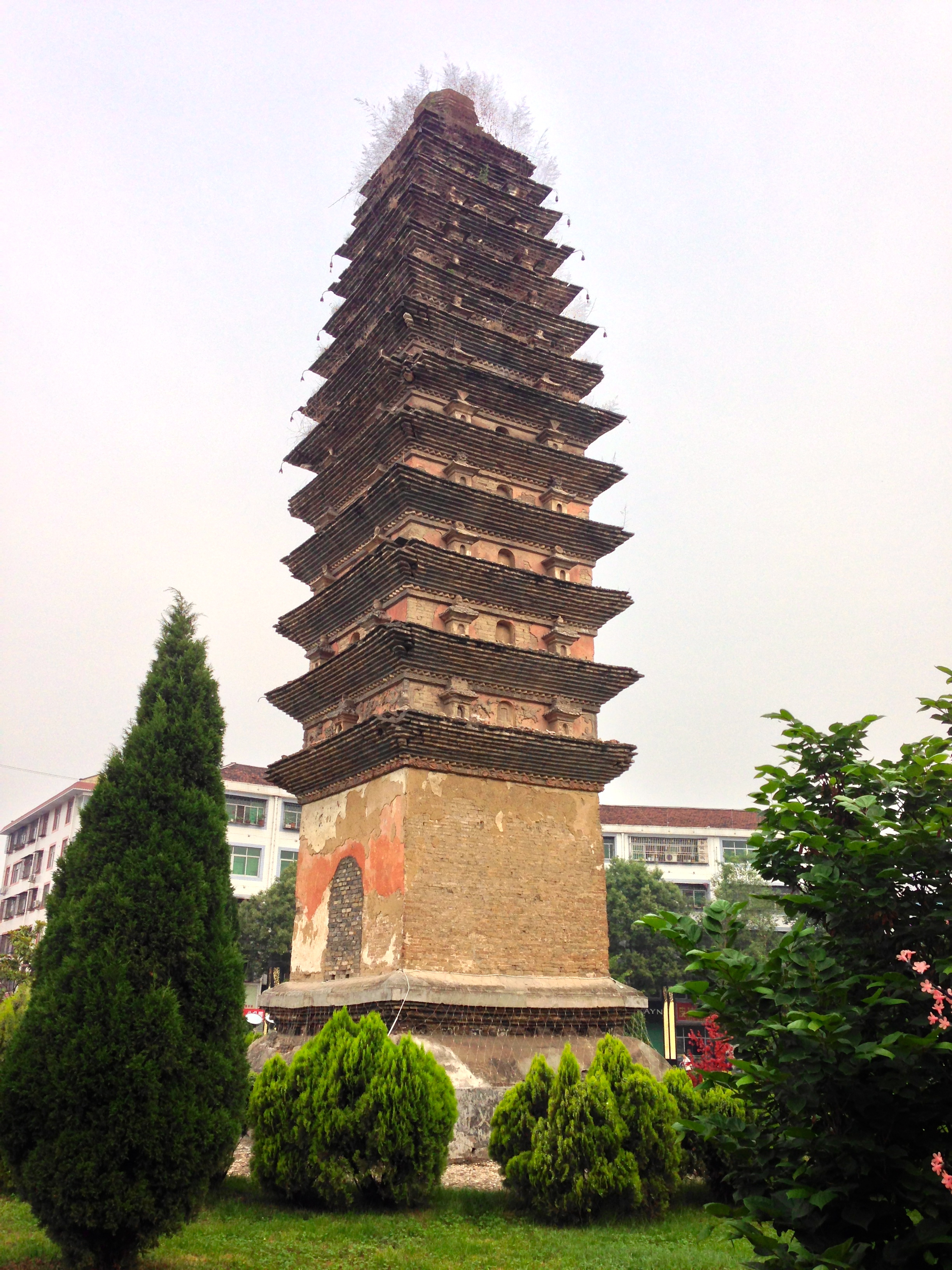 唐代佛塔